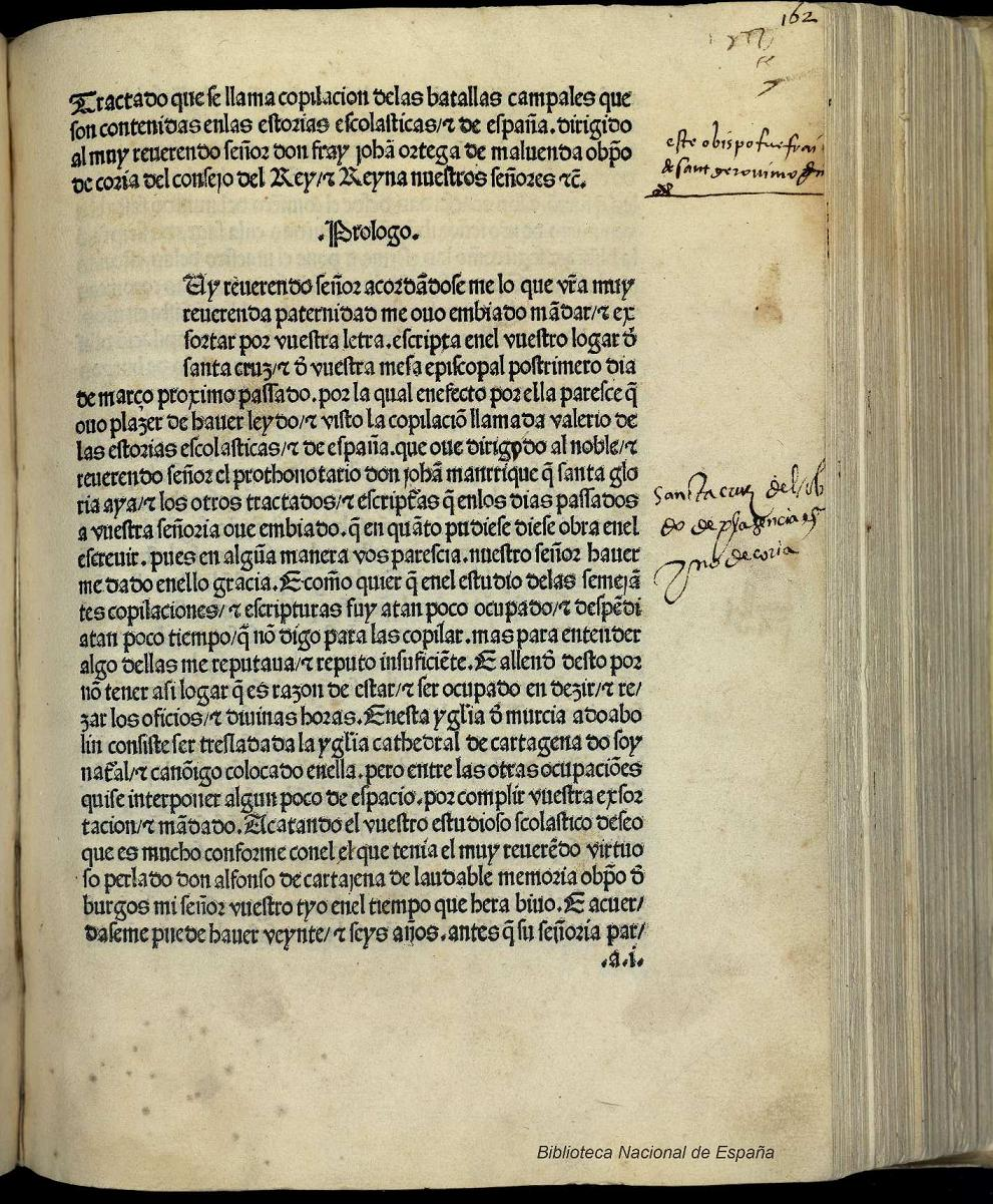 Copilación de las batallas campales Autor: Rodríguez de Almela, Diego ; Martínez de Cascales, Antón ; Córdoba, Juan de (fl. 1482) Fecha: 1487 Datos de edición: En la muy noble [et] leal cibdad de murcia por manos de maestre Lope d[e] la Roca aleman Impressor de libros